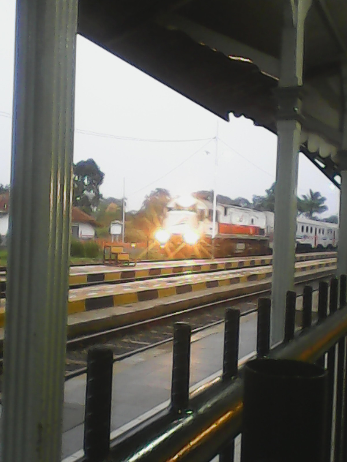 KA Lokal Bandung Raya di Stasiun Cicalengka